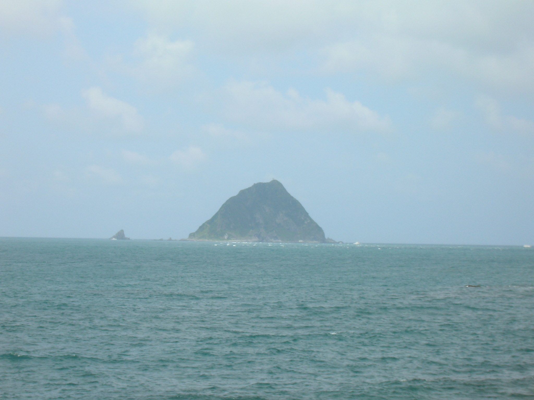 基隆嶼。攝於基隆港東防波堤。